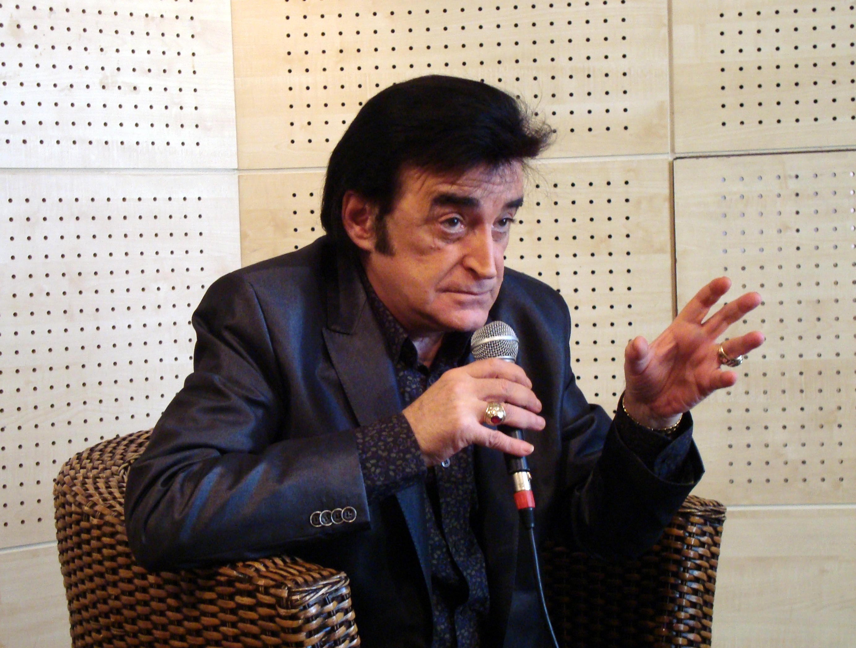 DICK RIVERS interview à la FNAC de Paris pour la sortie de l'album " l'homme sans âge" (sept 2008)